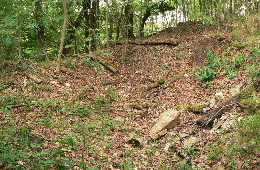 Bodenstörungen neben Burghügel der Alten Burg (Bühle), evt. neuzeitlicher Steinbruch